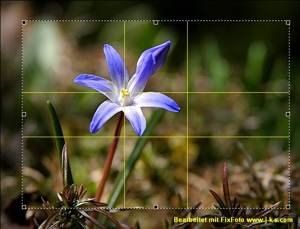 FixFoto Screenshot Goldener Schnitt Screenshot der Bildbearbeitungssoftware FixFoto vom Bildkanten-Beschneidewerkzeug mit eingeschalteter Goldener Schnitt Option.